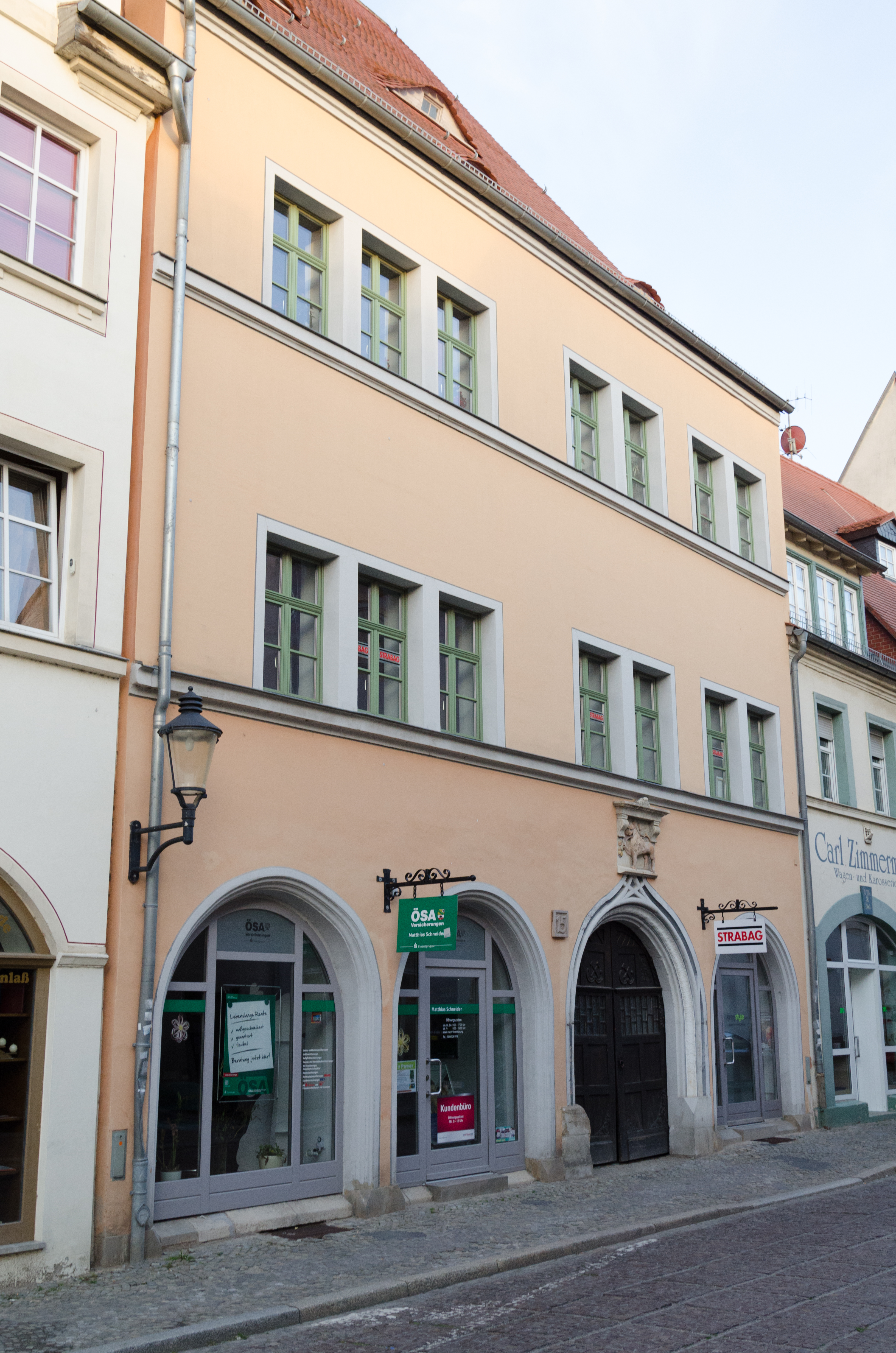 Naumburg, Marienstraße 15